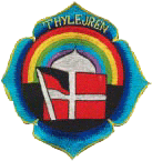 Thylejrens Logo